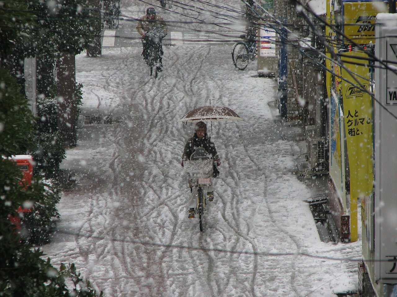 ２００８大阪の雪